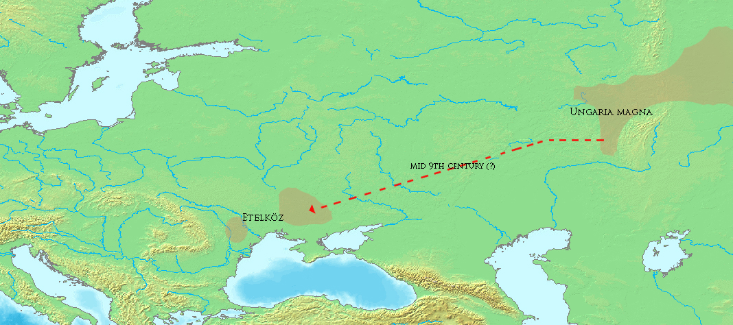 A magyarok vándorlása a honfoglalás kori régészeti hagyaték keleti párhuzamainak elterjedése alapján. (forrás: Sudár B. - Petkes Zs. (szerk.): A honfoglalók viselete. 32. oldal)